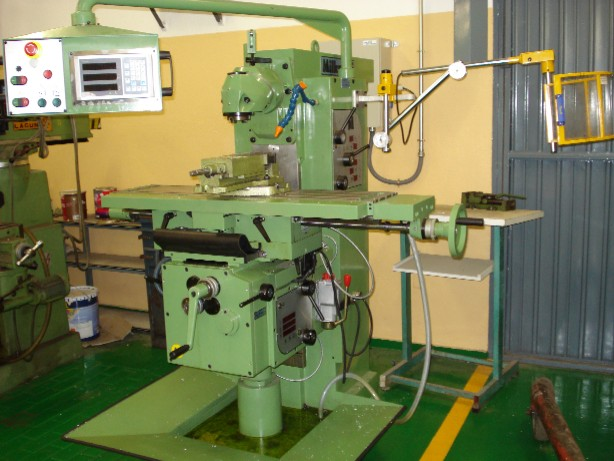 Fresadora universal equipada con cabezal vertical